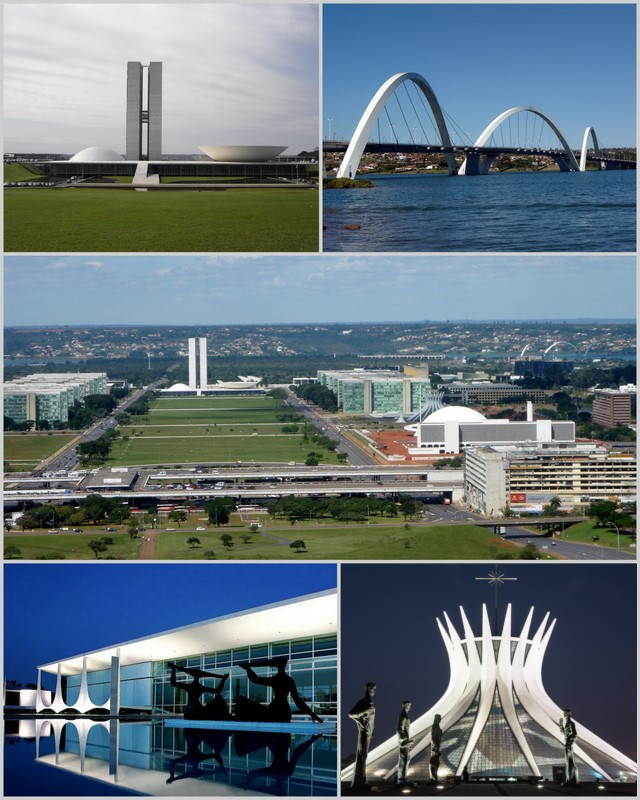 Montagem de fotos da cidade de Brasília, Brasil